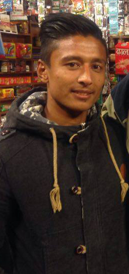 नेपाली: नवयुग श्रेष्ठ